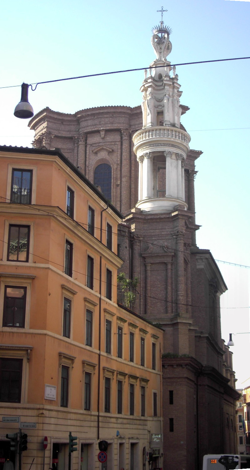 Roma , via Capolecase e sant'Andrea delle Fratte, lanterna e campanile (opera di Francesco Borromini)